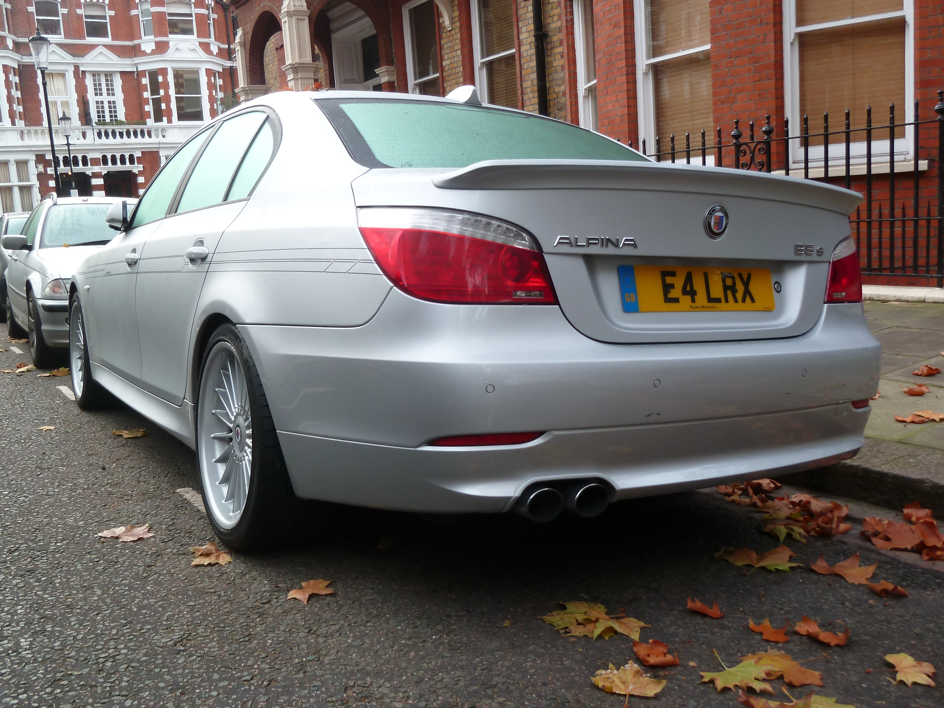 bmw Alpina B5